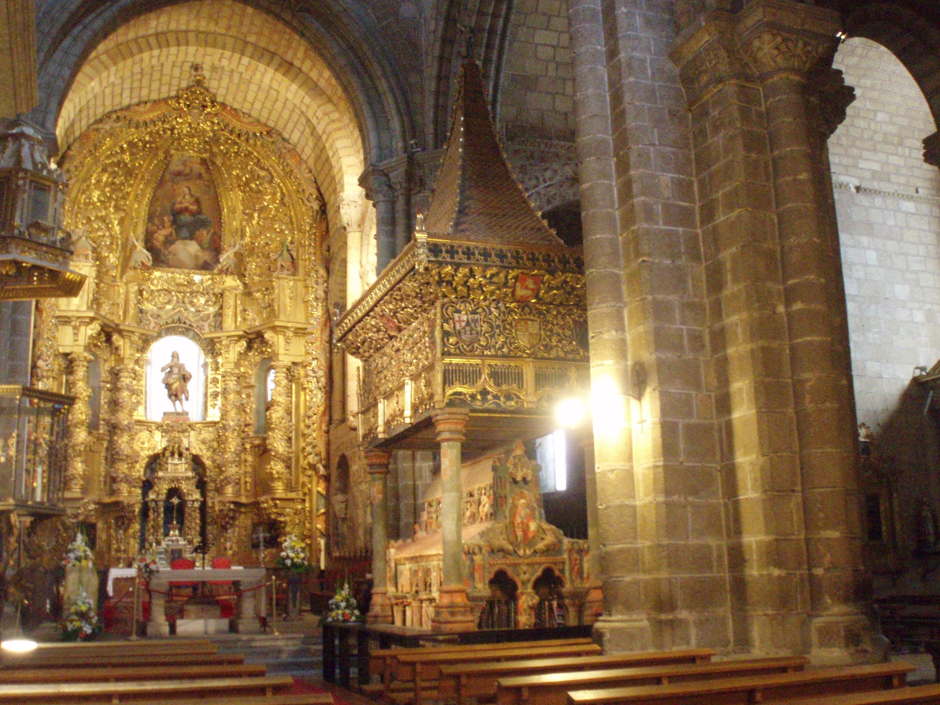 Tumba de los Santos Hermanos